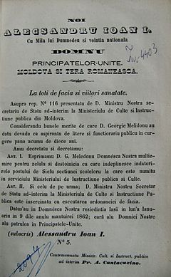 Décret du 9 janvier 1862 du prince Alexandru Ioan Cuza qui nomme George Radu Melidon chef de section au Ministère des Cultes et de l'Instruction publique..